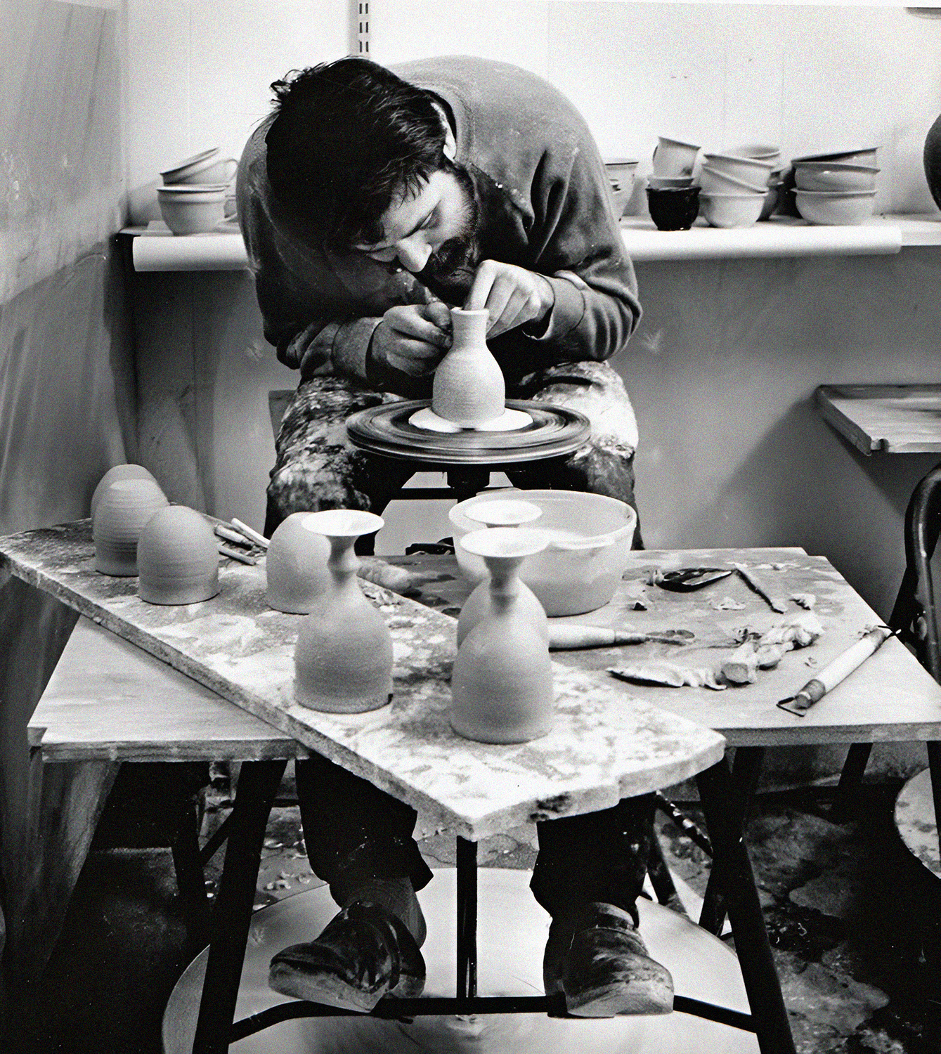 Krukmakare - Drejeriet Malmö 1985.